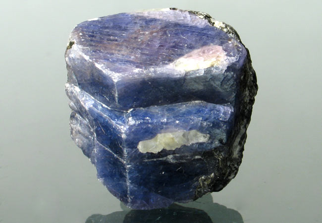 minerał; korund - szafir, pochodzenie Madagaskar, autor zdjęcia Stowarzyszenie Spirifer 10.07.2006r.